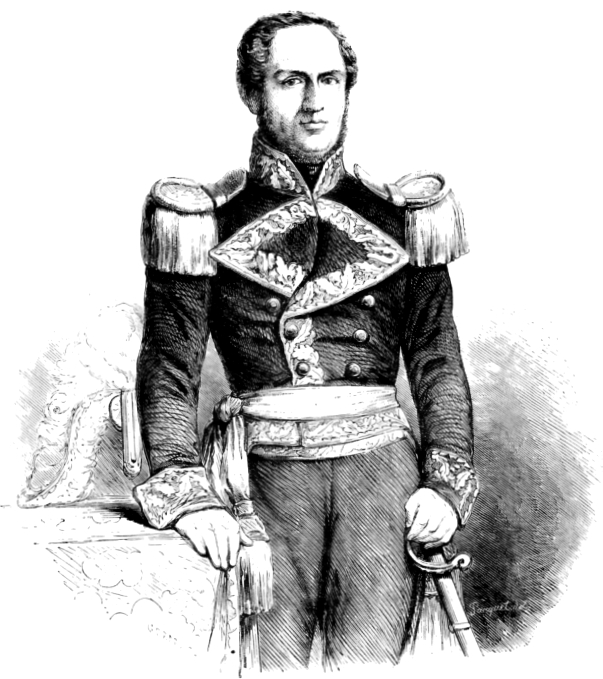 José Rufino Echenique Benavente (1808 - 1887), militar y político peruano. Presidente Constitucional de la República del Perú entre 1851 y 1855.